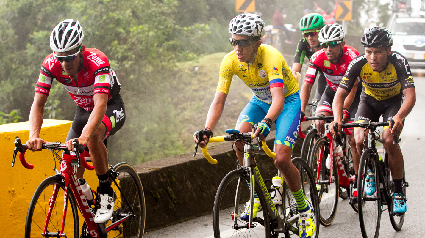 La escapada decisiva Etapa 4 Vuelta a Colombia 2017 Viernes 4 de agosto de 2017. Barrancabermeja - Alto El Picacho 165,3Kms.